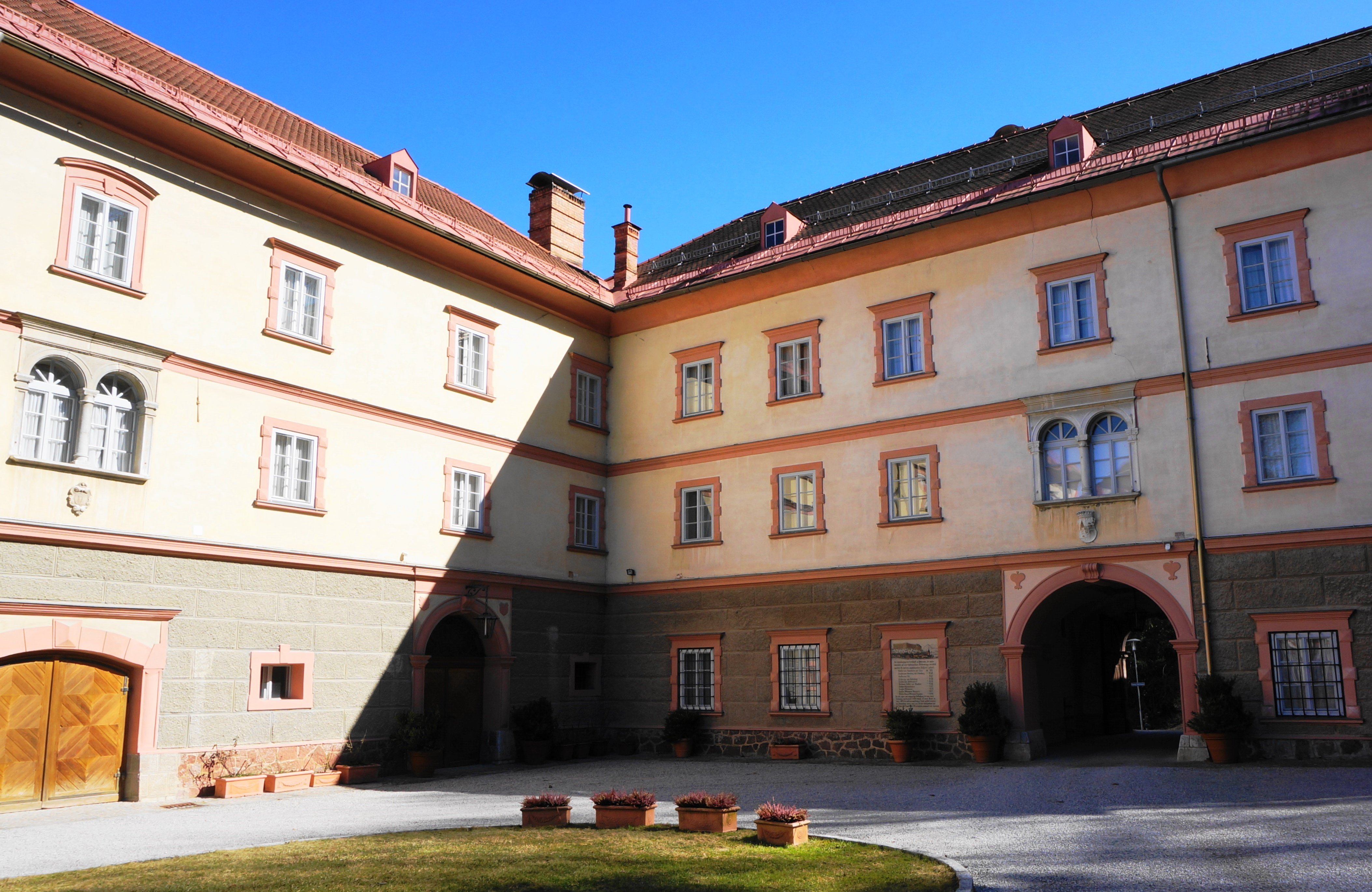 Schloss Paternion nordwestliche Hofecke mit Sitz der Forstverwaltung in Paternion, Bezirk Villach Land